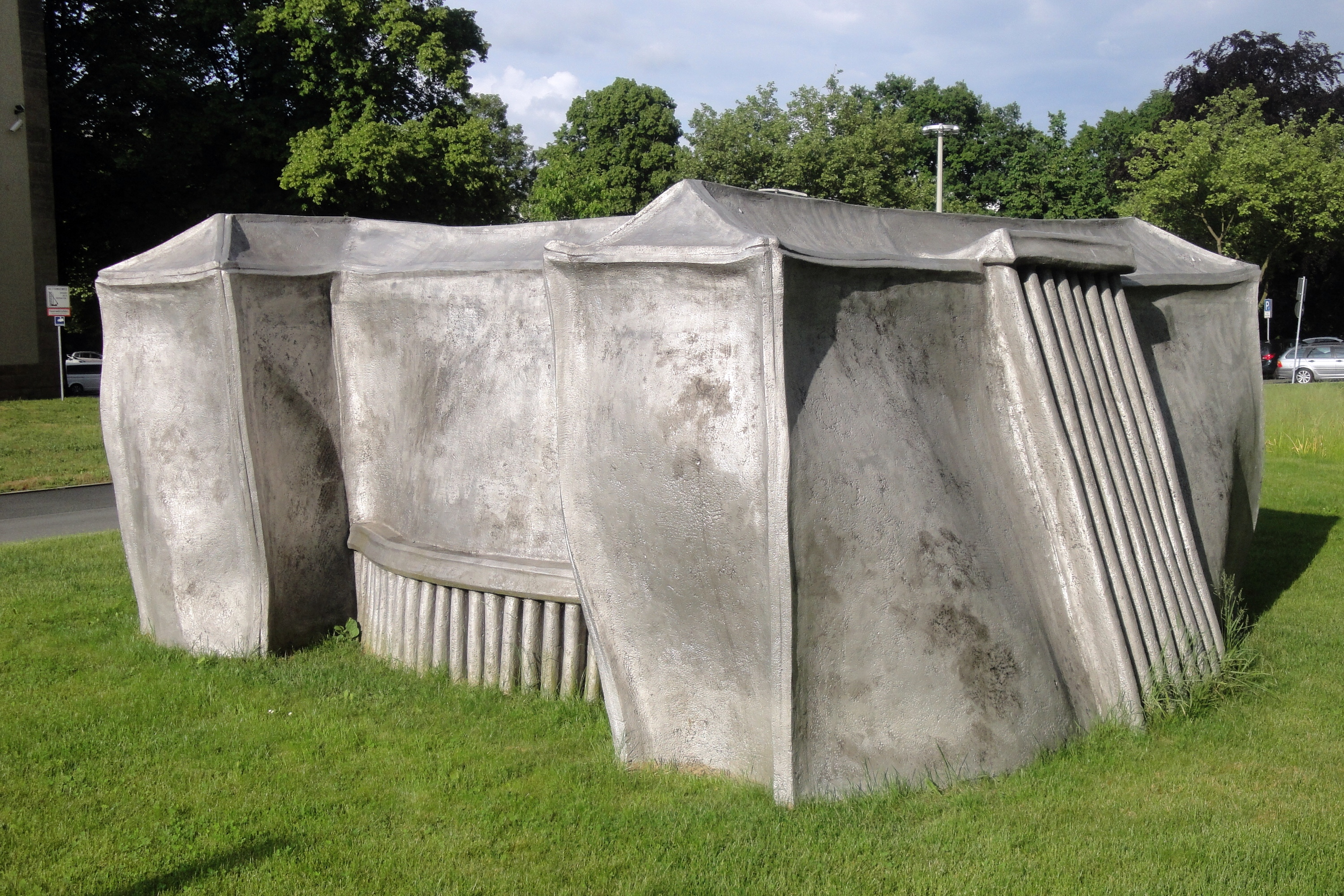 Skulptur Weiches Haus von Gabriele Obermeier in Kassel